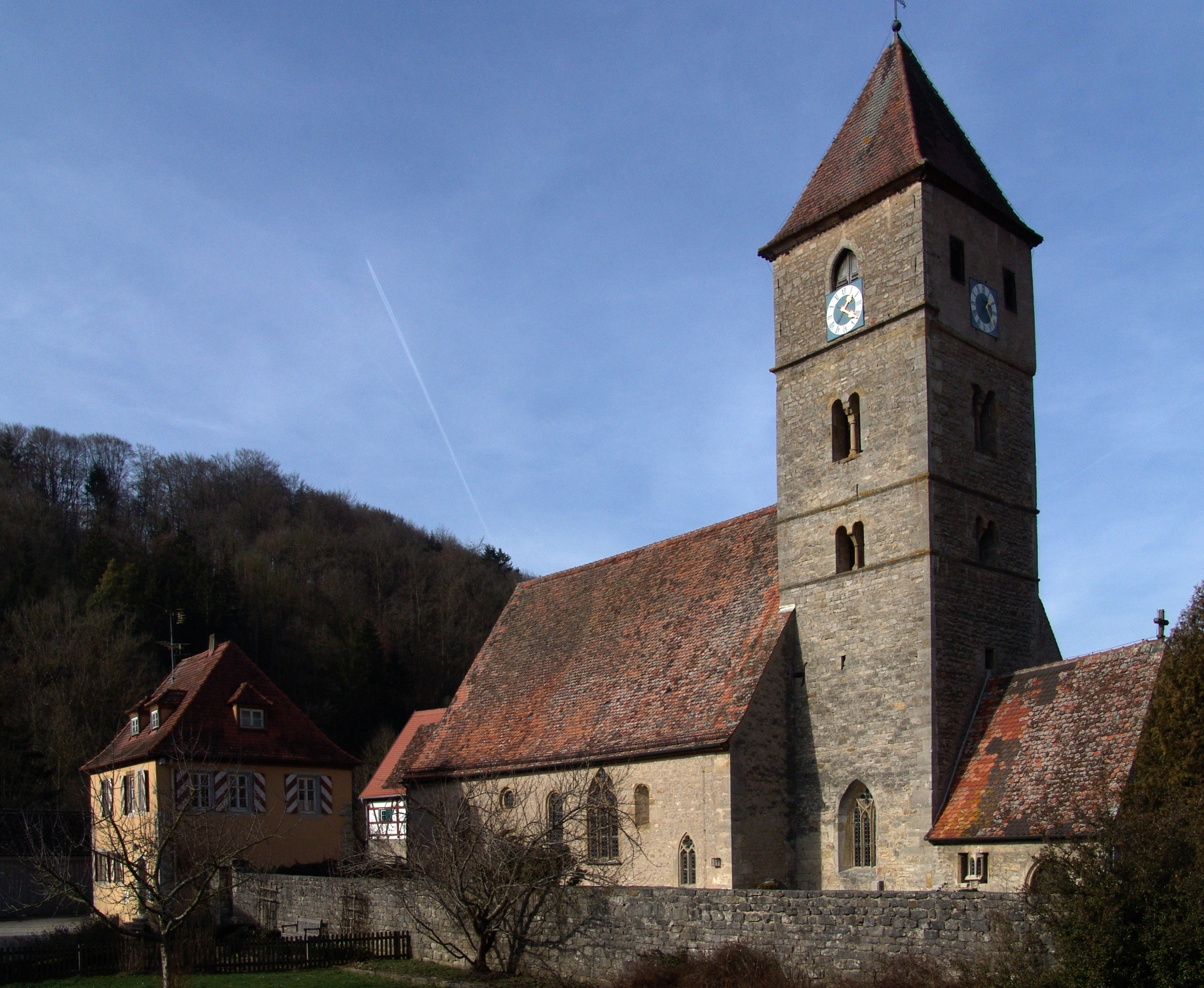 Detwang, Kirche St. Peter und Paul